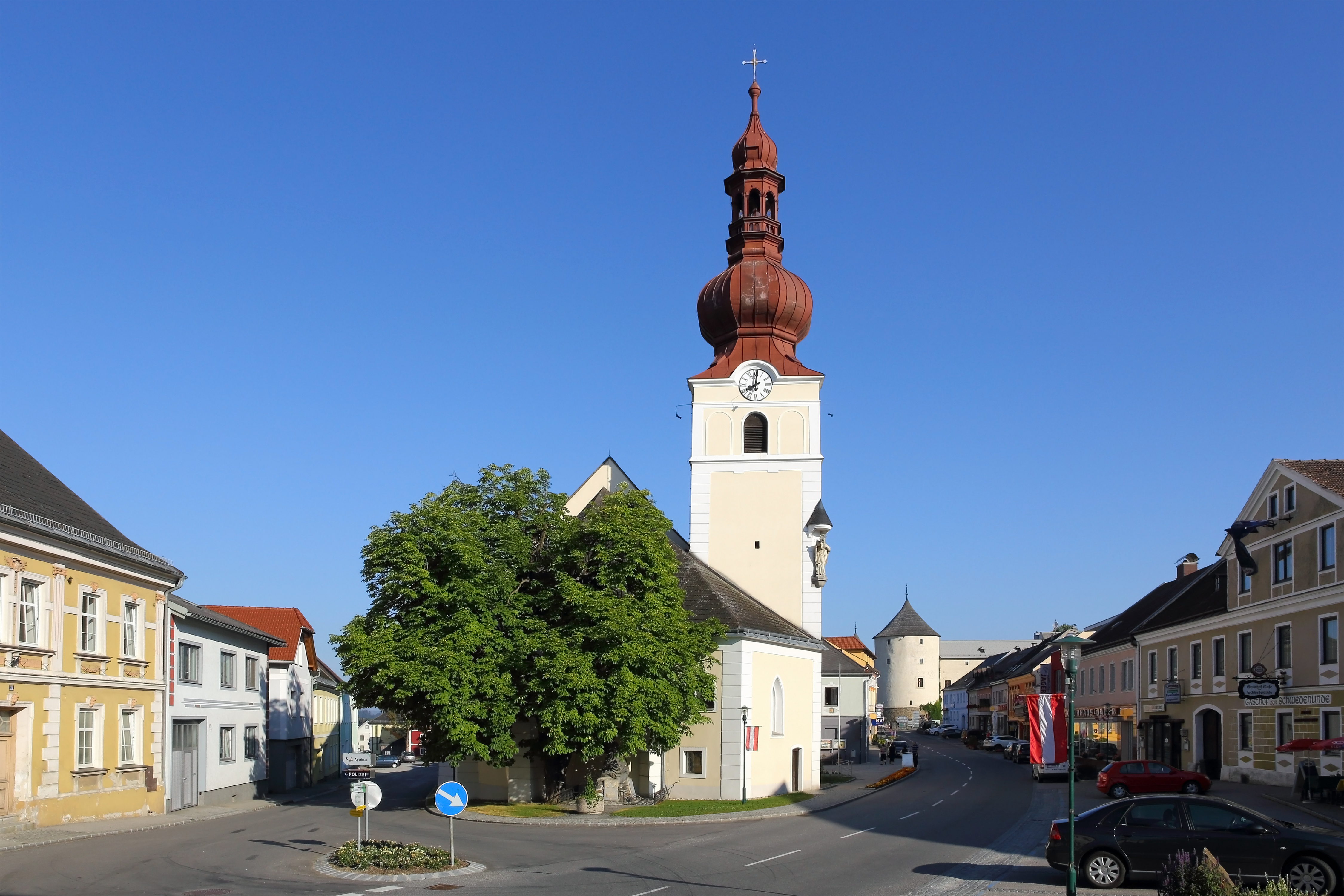 Die kath. Pfarrkirche hl. Jakobus der Ältere in Ottenschlag wurde erstmals 1490 urkundlich erwähnt. Im Vordergrund eine 1977 zum Naturdenkmal erklärte Rosskastanie. This media shows the natural monument in Lower Austria with the ID ZT-081.